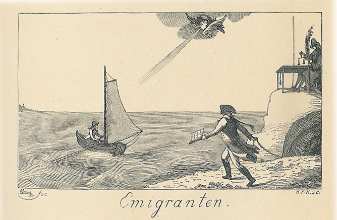 Emigranten. Satirisk stik over Malthe Conrad Bruuns flugt til Sverige